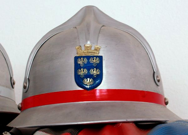 Helm "Wiener Form" der Freiwilligen Feuerwehr Felling (Stadtgemeinde Hardegg, Niederösterreich)